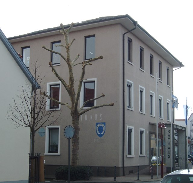 Rathaus in Brühl